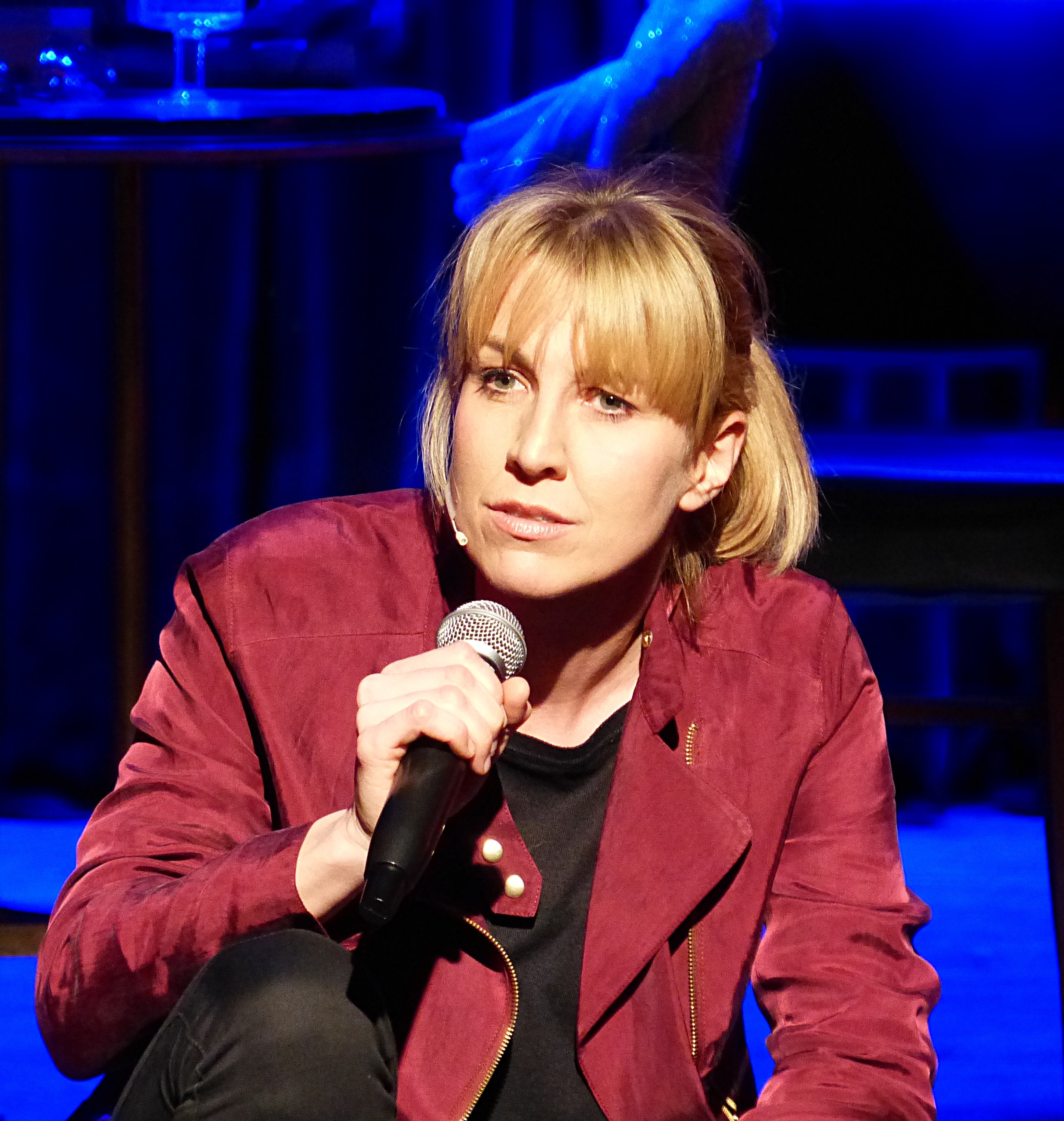 Nora Boeckler feierte am 23.11.2015 im Theater "Senftöpfchen" mit ihrem Solo-Programm "Spass ist mir Ernst" Premiere.